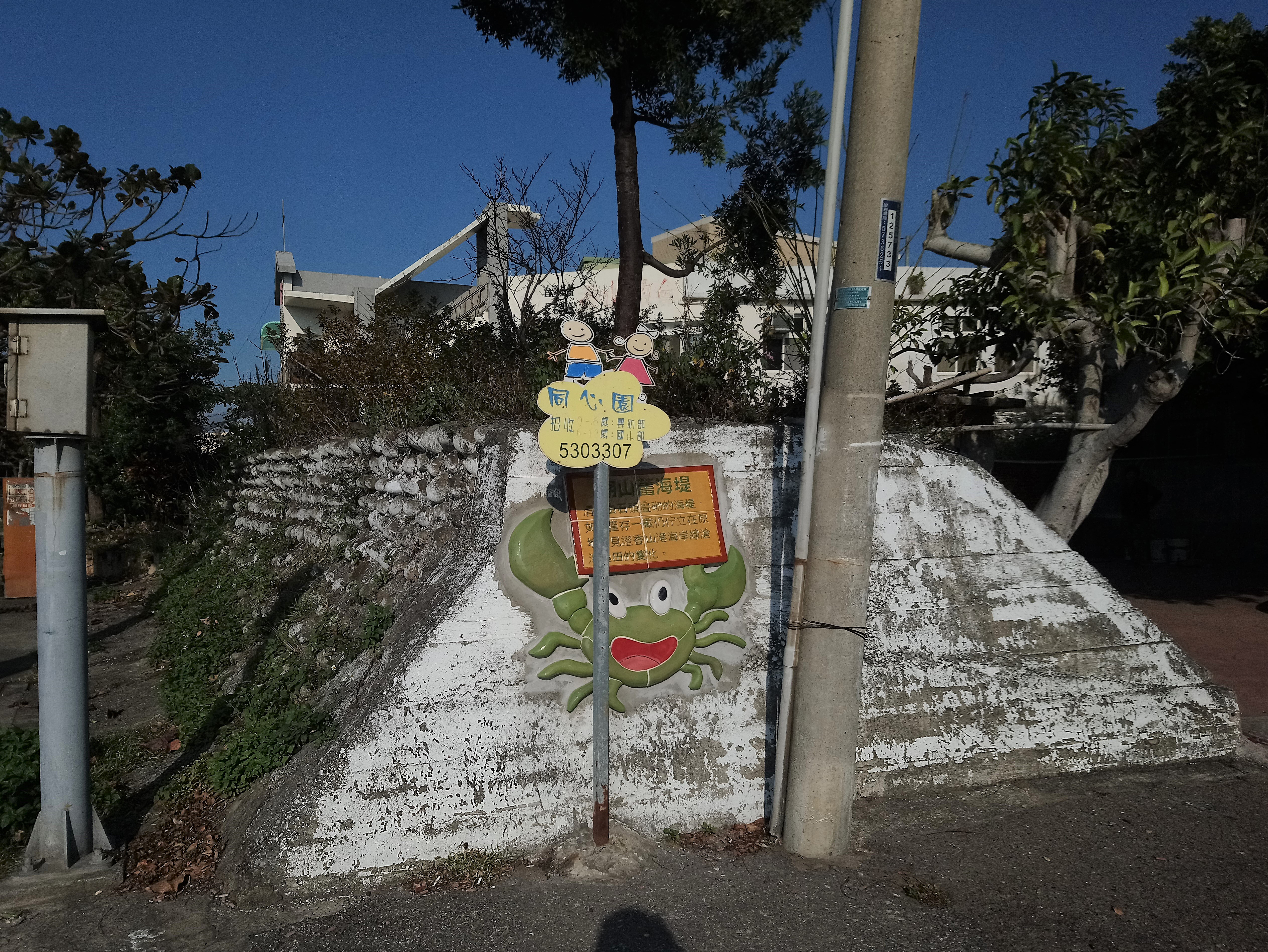 香山舊海堤,台灣省新竹市香山區香山聯里朝山里